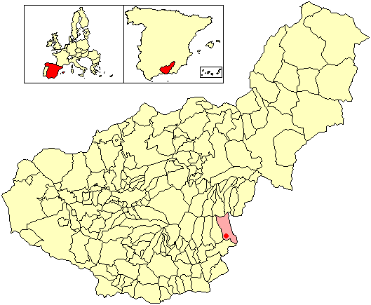 Situación de la Entidad de Ámbito Territorial Inferior al Municipio (EATIM) de Mairena (en el municipio de Nevada) respecto a la provincia de Granada, en España.